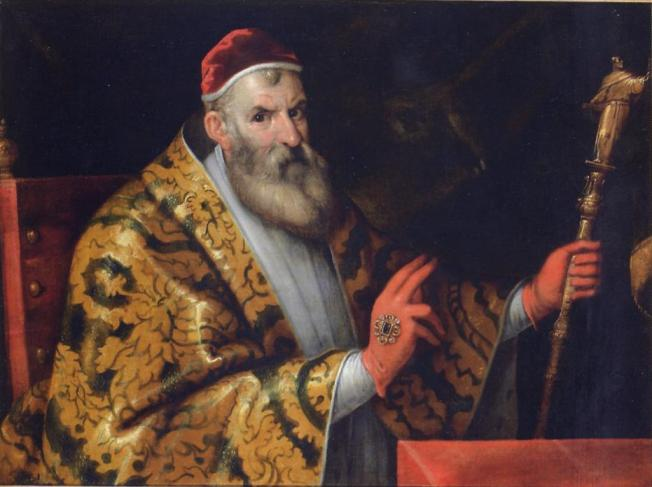 Filippo Bellini Filippo Bellini Oil on canvas - 84 x 110 cm Pau, Musée national du château Photo originale : Beaussant-Lefèvre